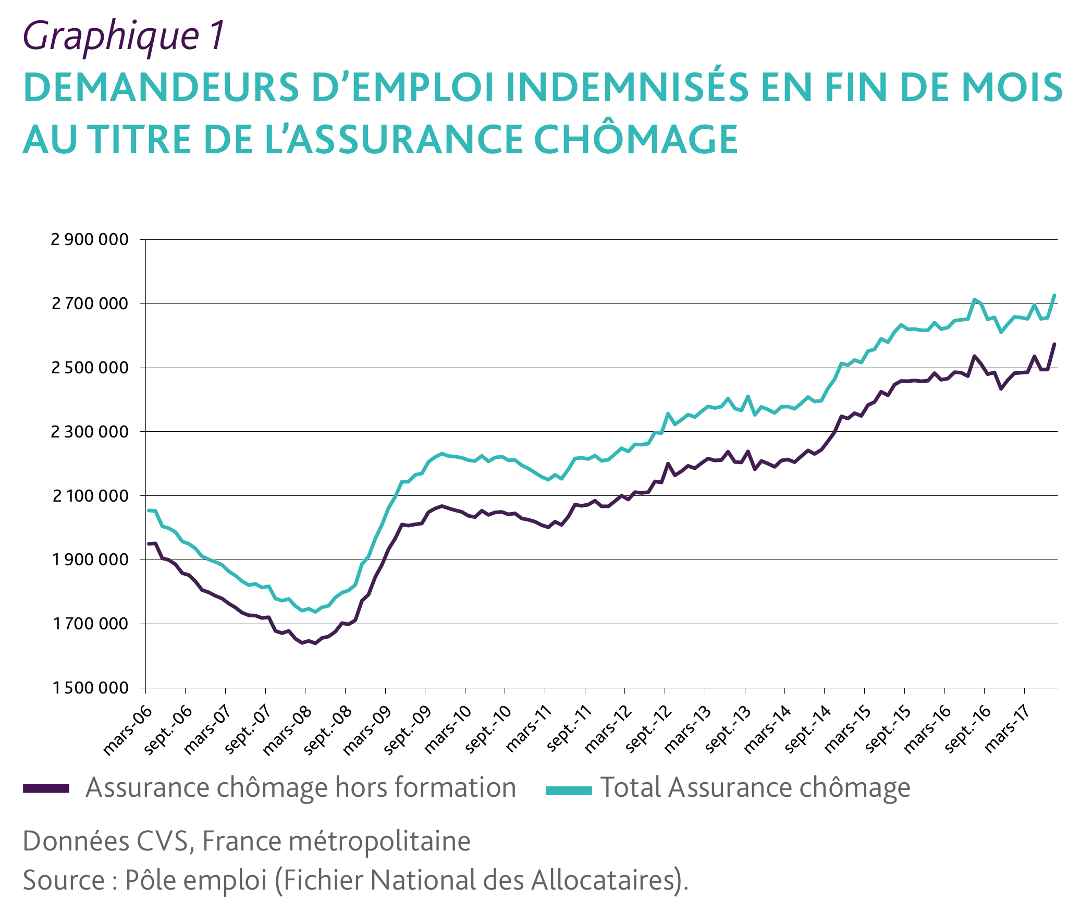 Effet sur le financement des demandeurs d'emploi